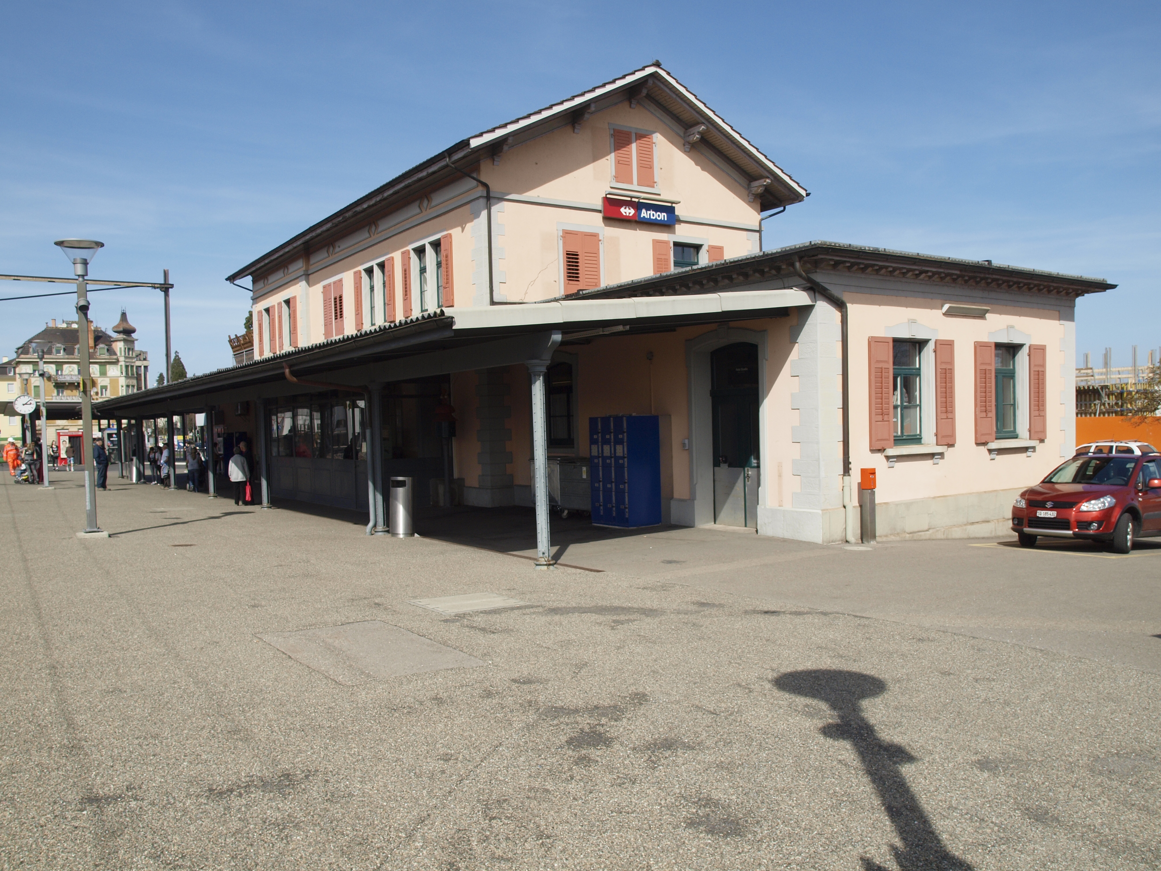 Das Aufnahmegebäude des Bahnhof Arbon